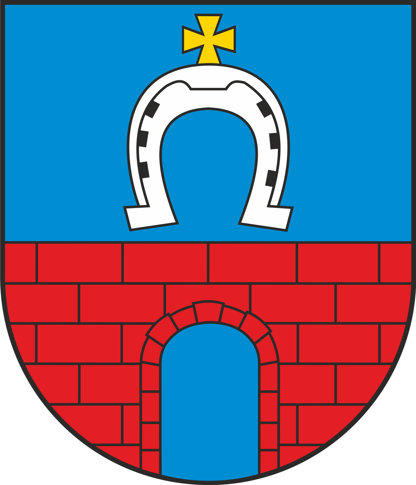 Herb gminy Rusiec